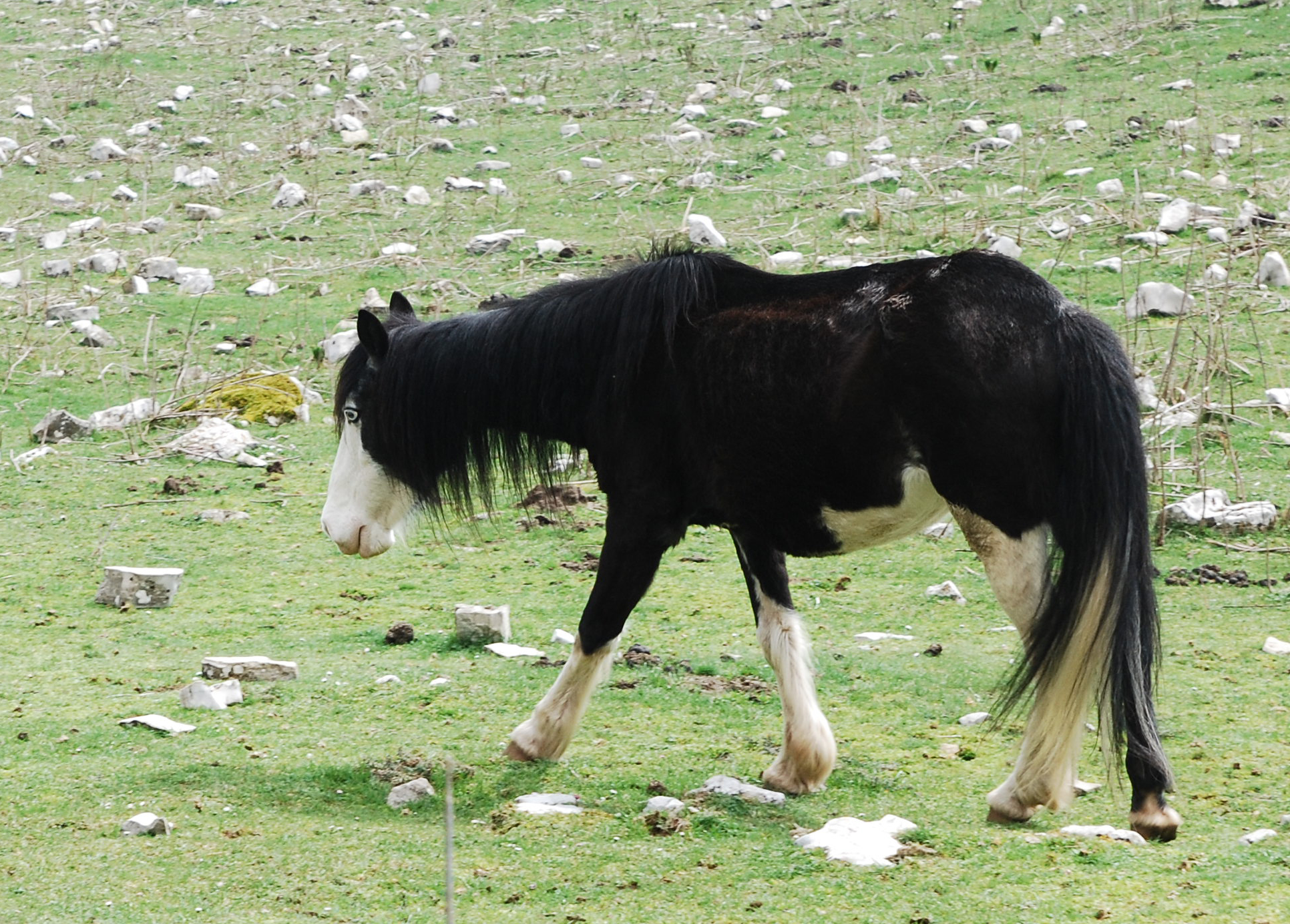 Cavallo Rosello